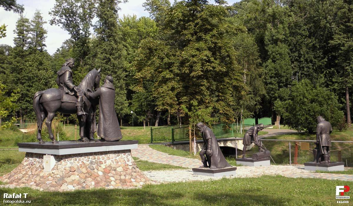 Figury przedstawiają króla Władysława Jagiełłę, czuwającego na budową starostę radomskiego Władysława Dobrogosta Czarnego z Odrzywołu oraz mistrza Jarosława, który nadzorował prace budowlane.